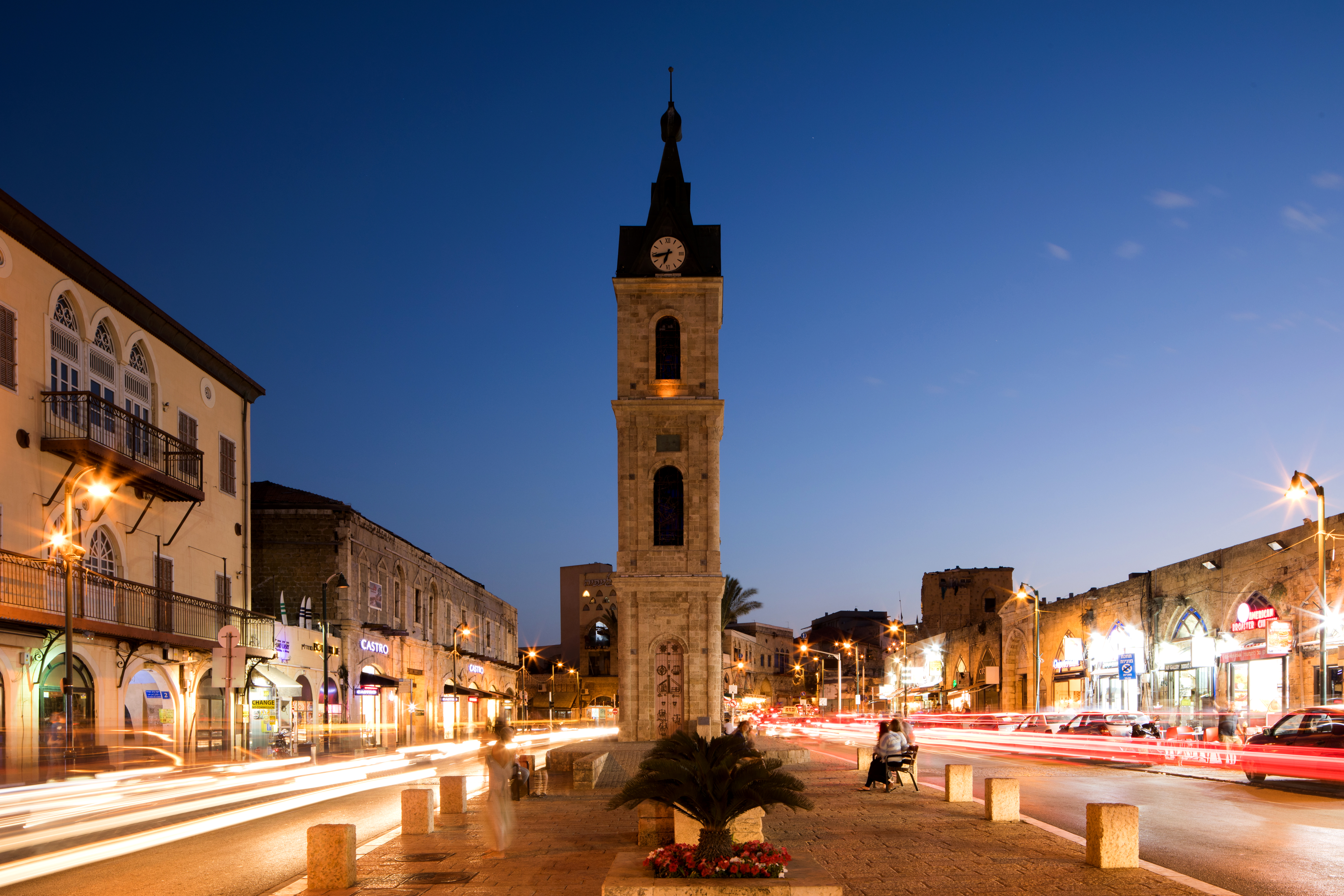 כיכר השעון (או כיכר הסוכנות) היא כיכר מרכזית ביפו, צפון מזרחית ליפו העתיקה. הכיכר נמצאת בקצה הצפוני של רחוב יפת ובקצהו הדרום-מערבי של רחוב רזיאל, שהיה בעבר חלק מן הדרך הראשית מיפו לפתח תקווה ולשכם.